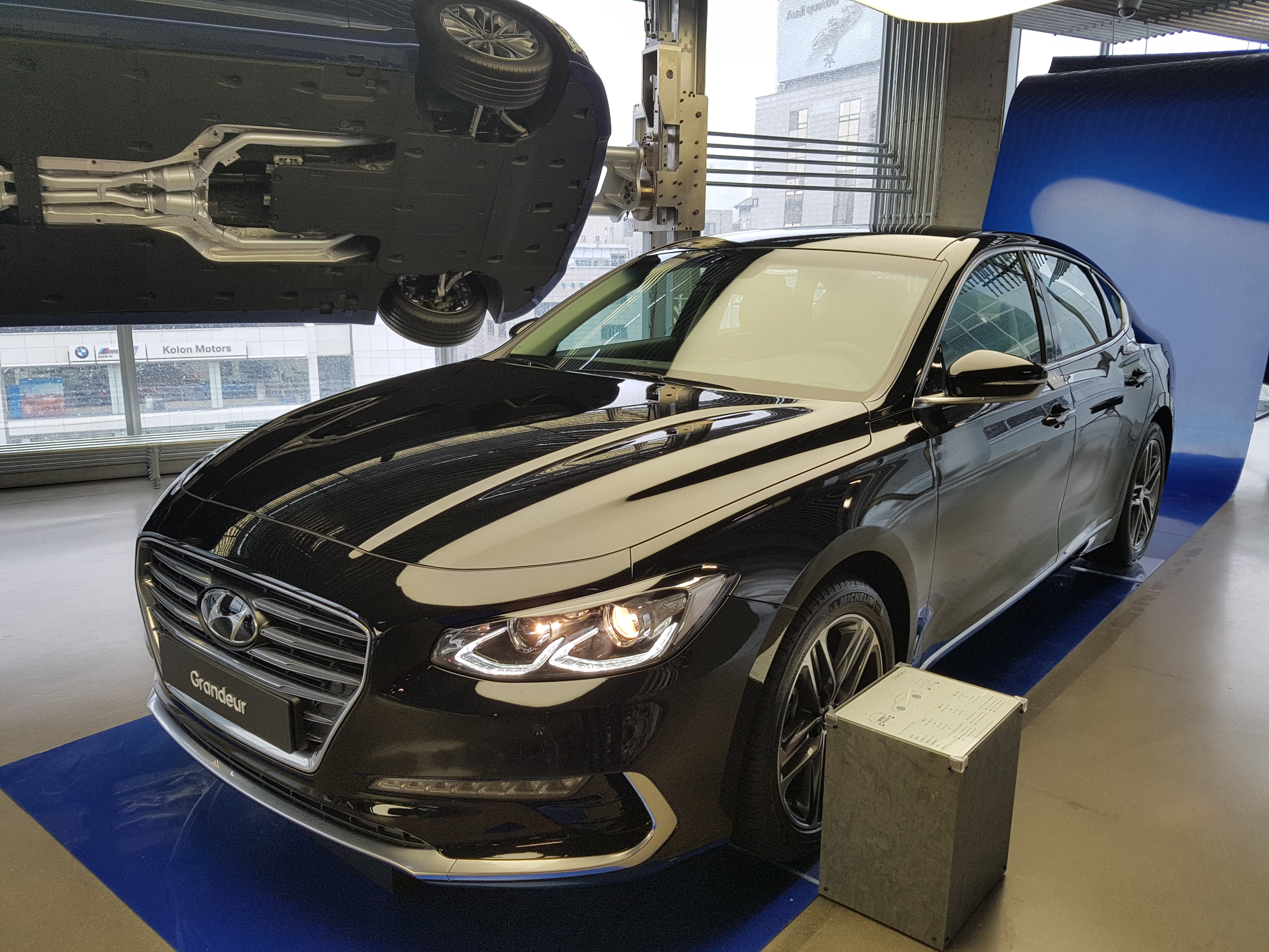 현대 그랜저(6세대) 정측면